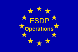 Flagge für Operationen unter der ESVP